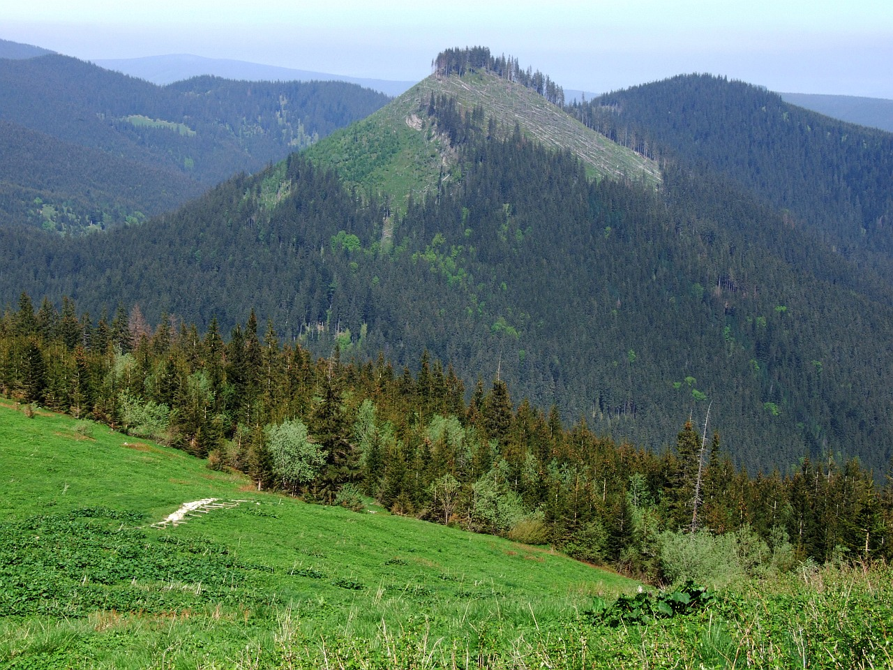 Zadnia Kopka, widok z Hali Upłaz